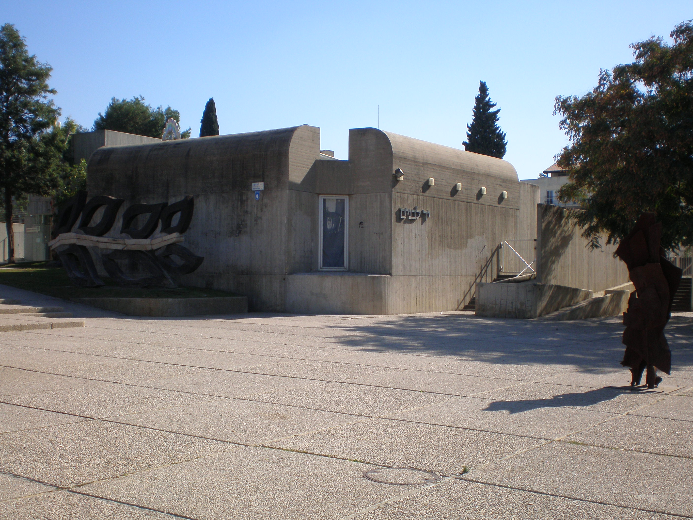 Yad_Labanim House, Herzliya